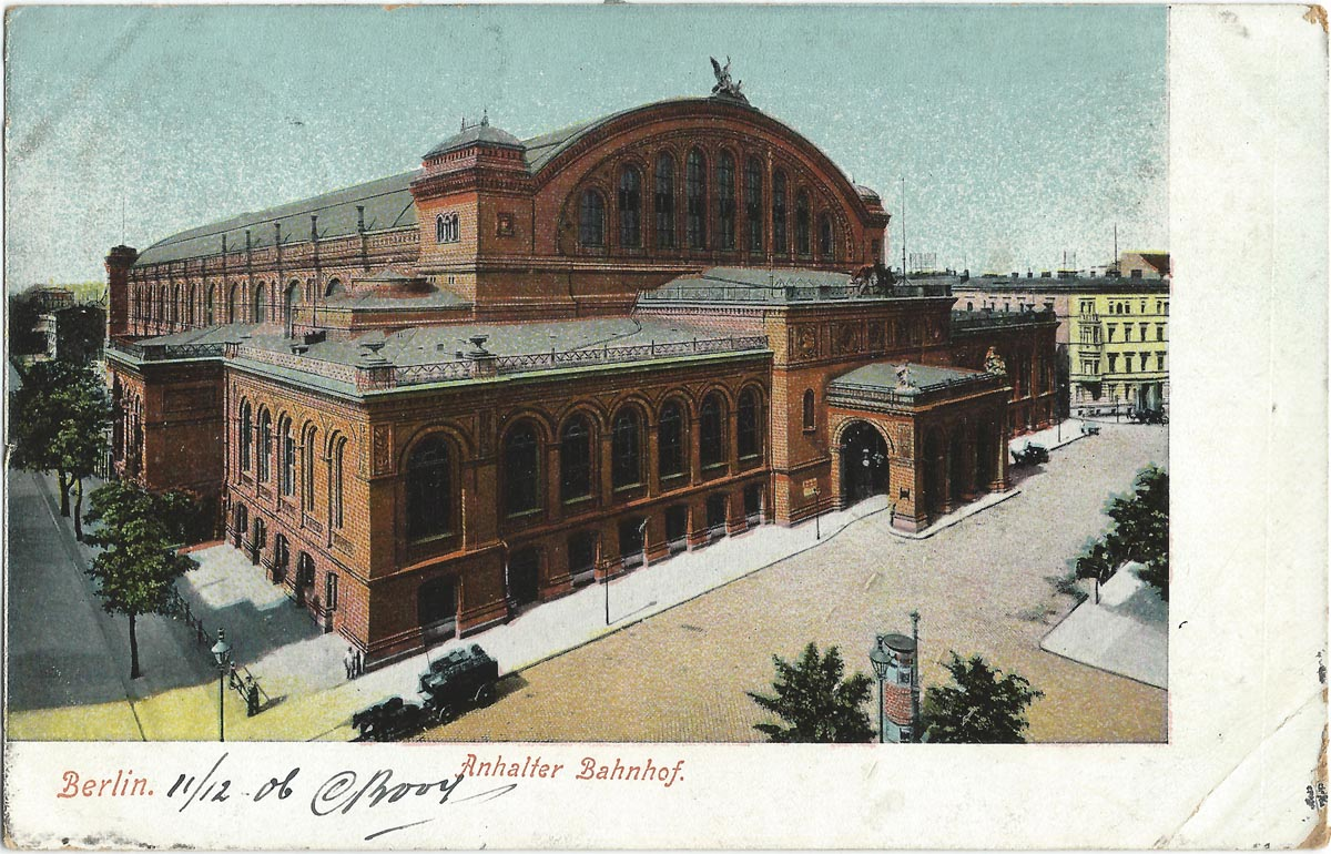 Vue de Berlin au début du XXe siècle (carte postale).